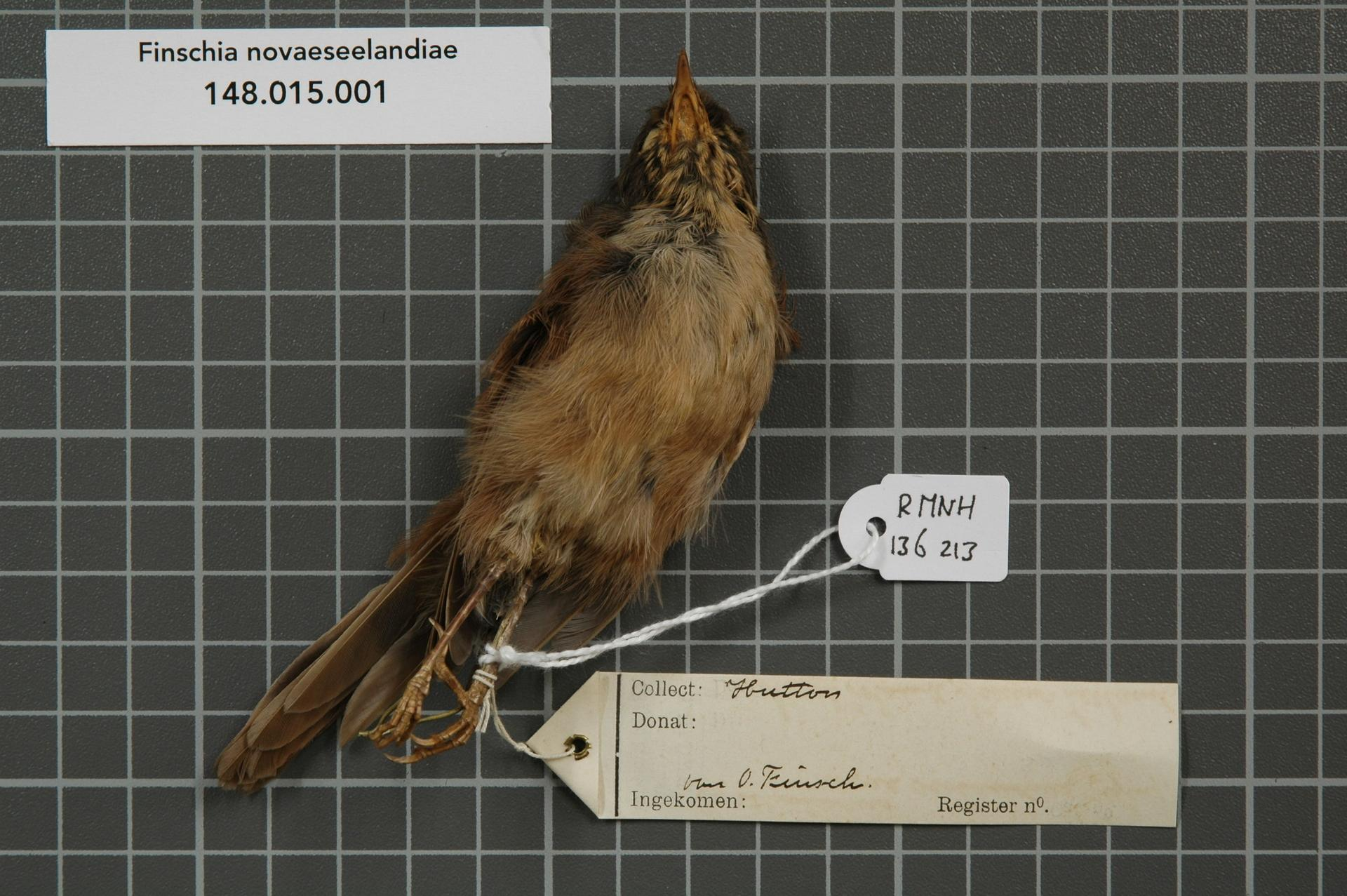 Finschia novaeseelandiae (Gmelin, 1789)